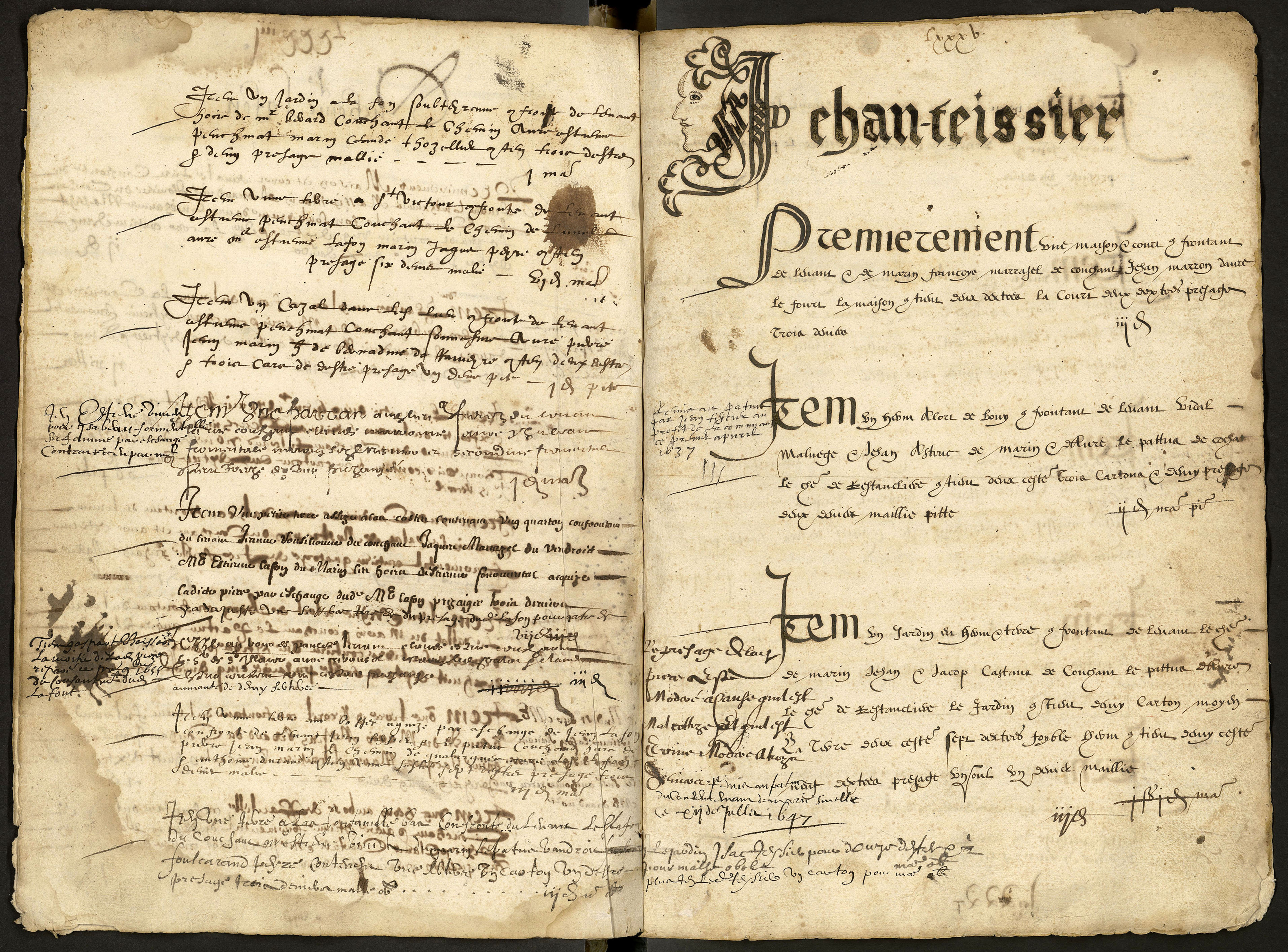 Saussines. - Usuel du compoix de 1600.